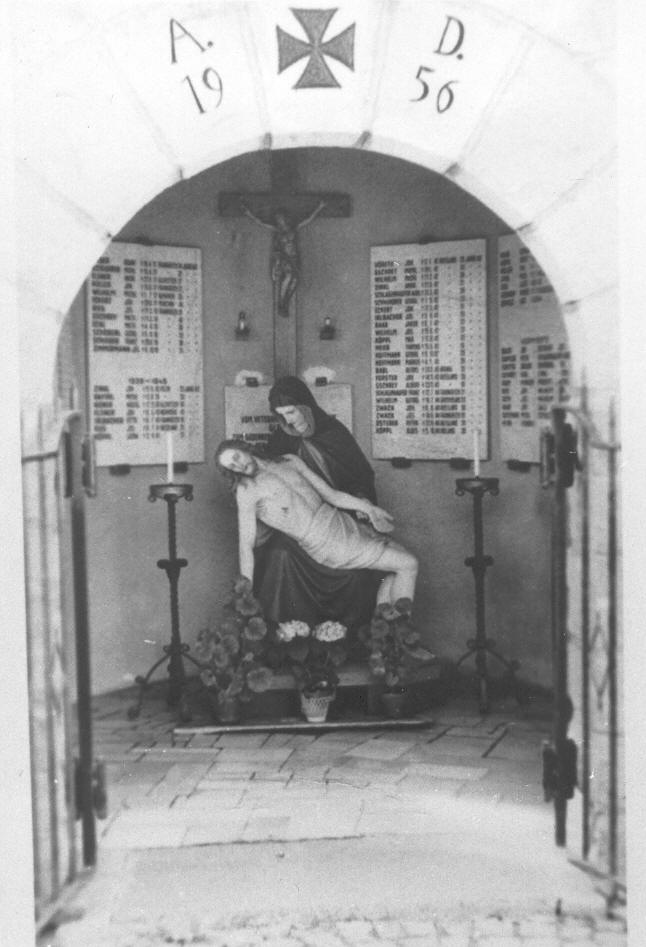 Ehemaliges Kriegerdenkmal in Gleiritsch aus dem Jahre 1956 auf dem alten Friedhof.